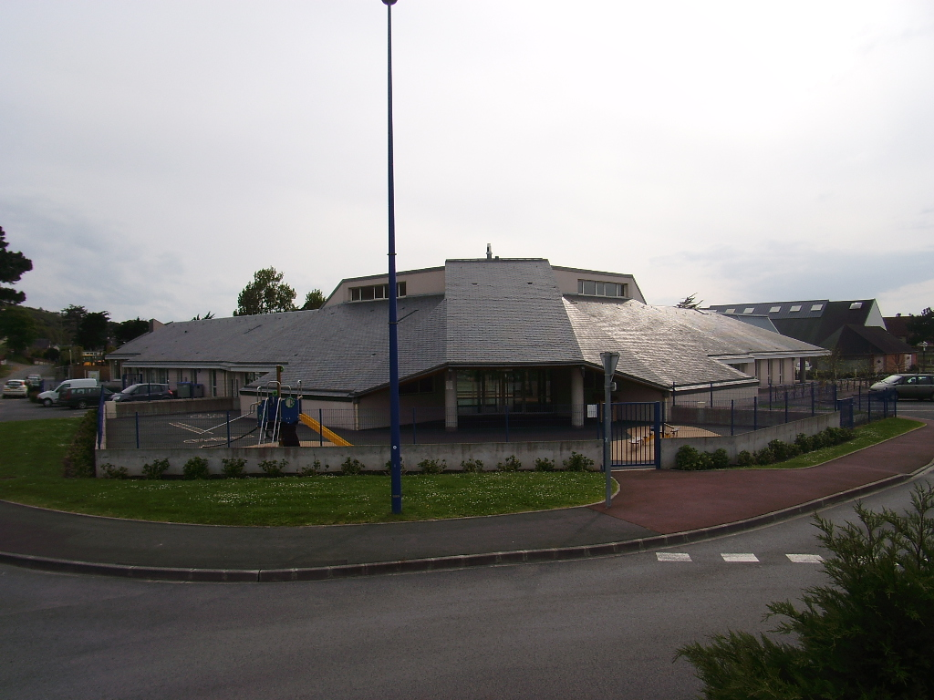 L'école Eric Tabarly de Jullouville (50)